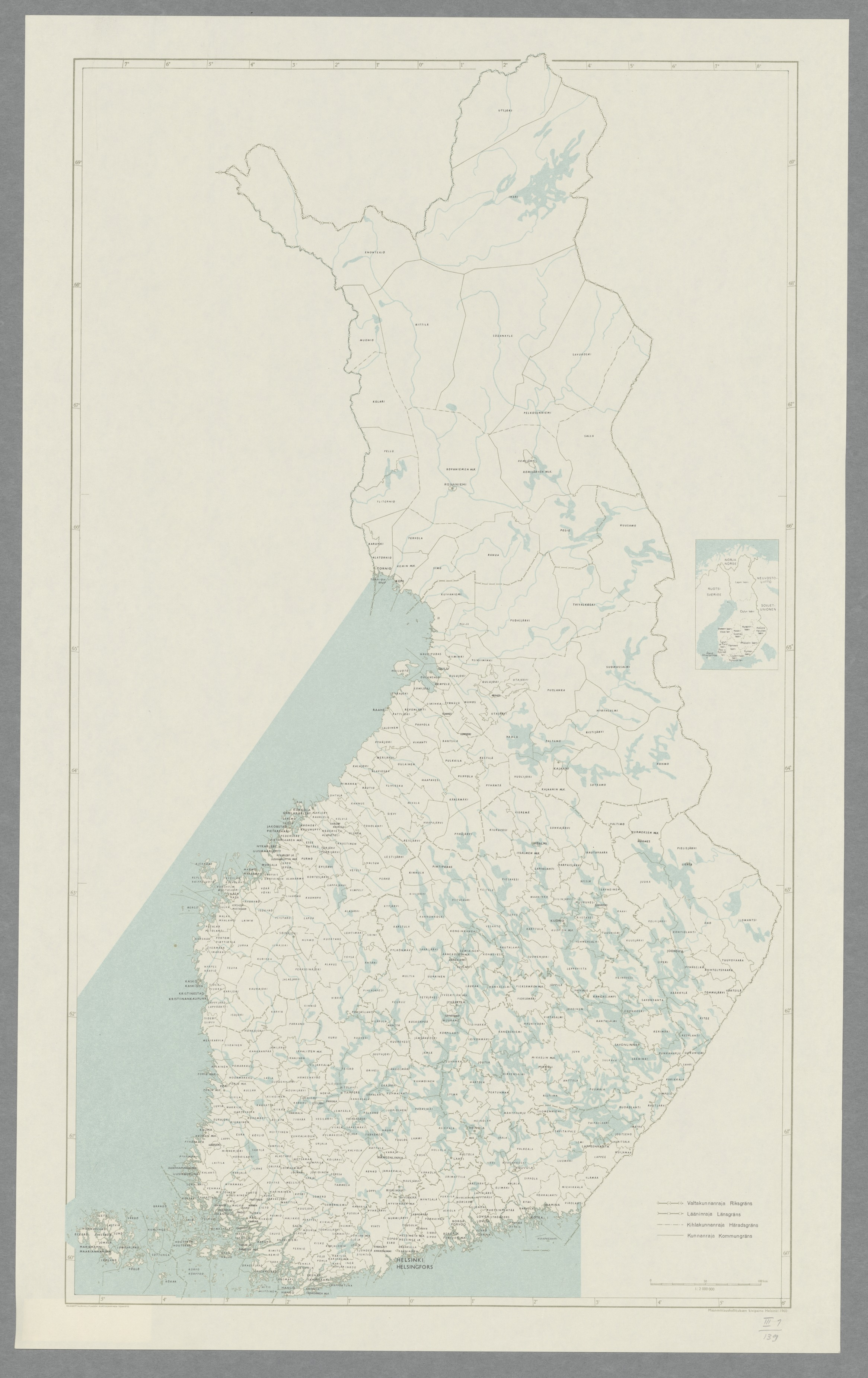 Suomen tilastokartta 1960; kuntajaot